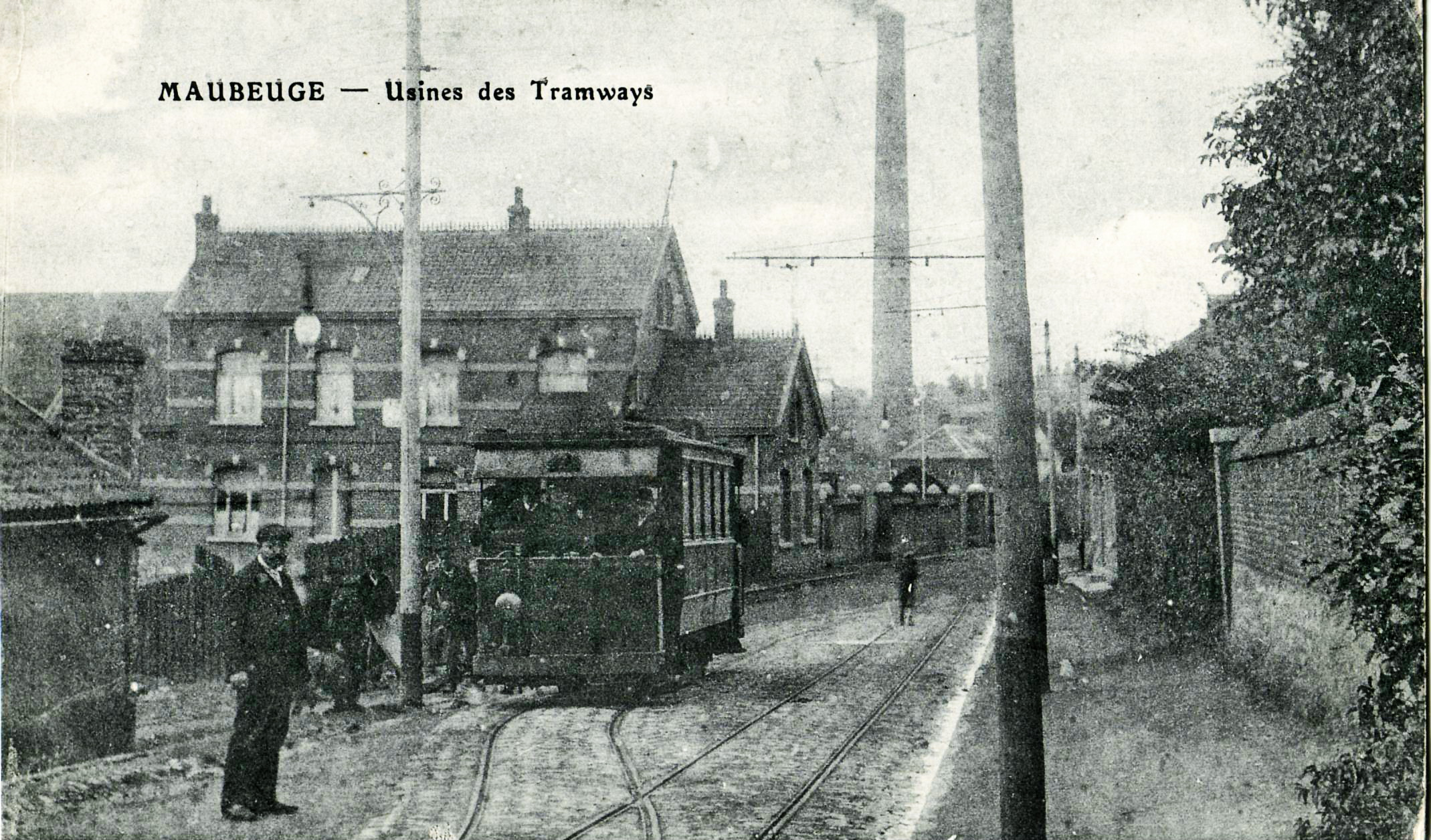 Carte postale ancienne sans mention d'éditeur : MAUBEUGE - Usine des Tramways